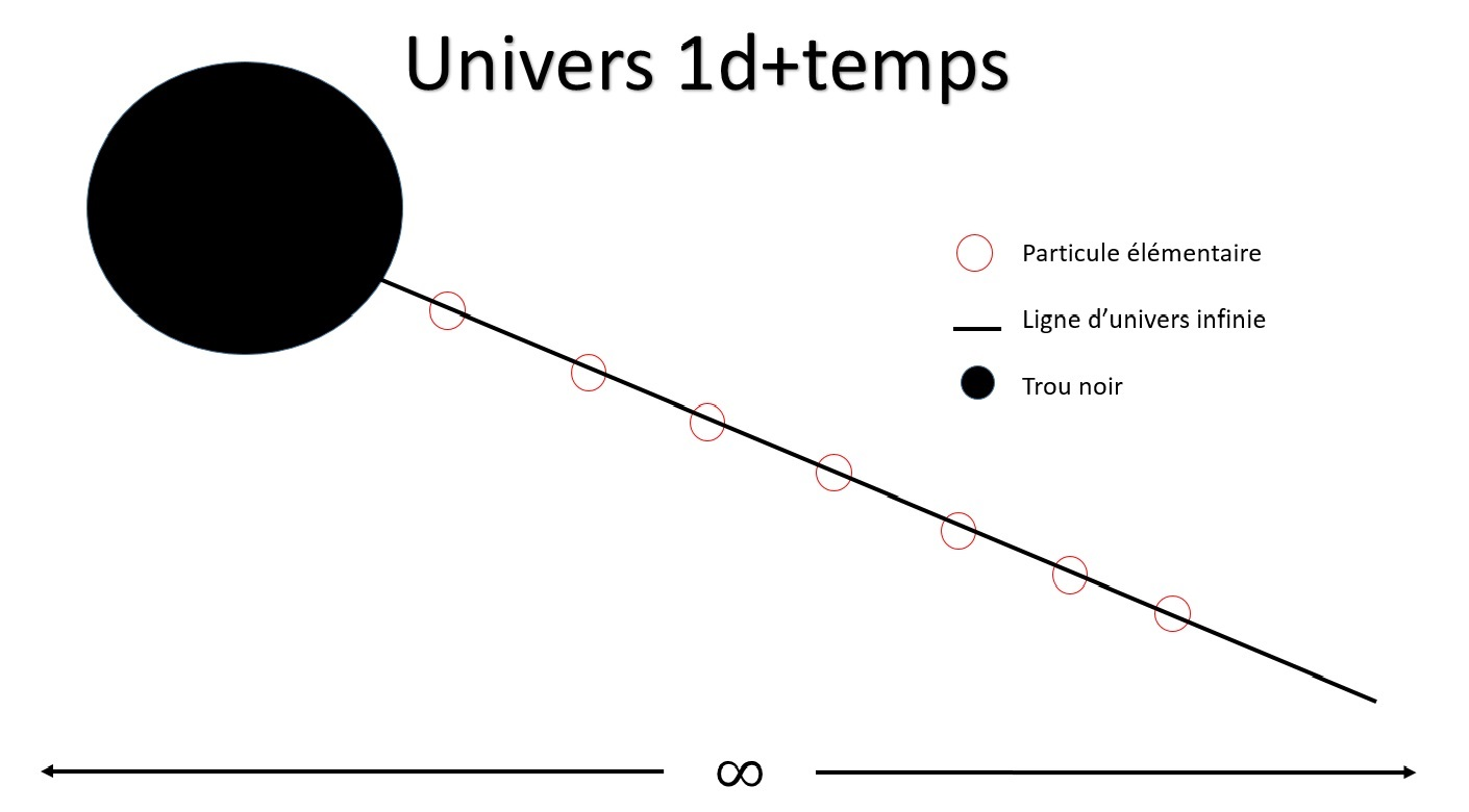 Représentation d'un univers à une dimension d'espace et d'un temps